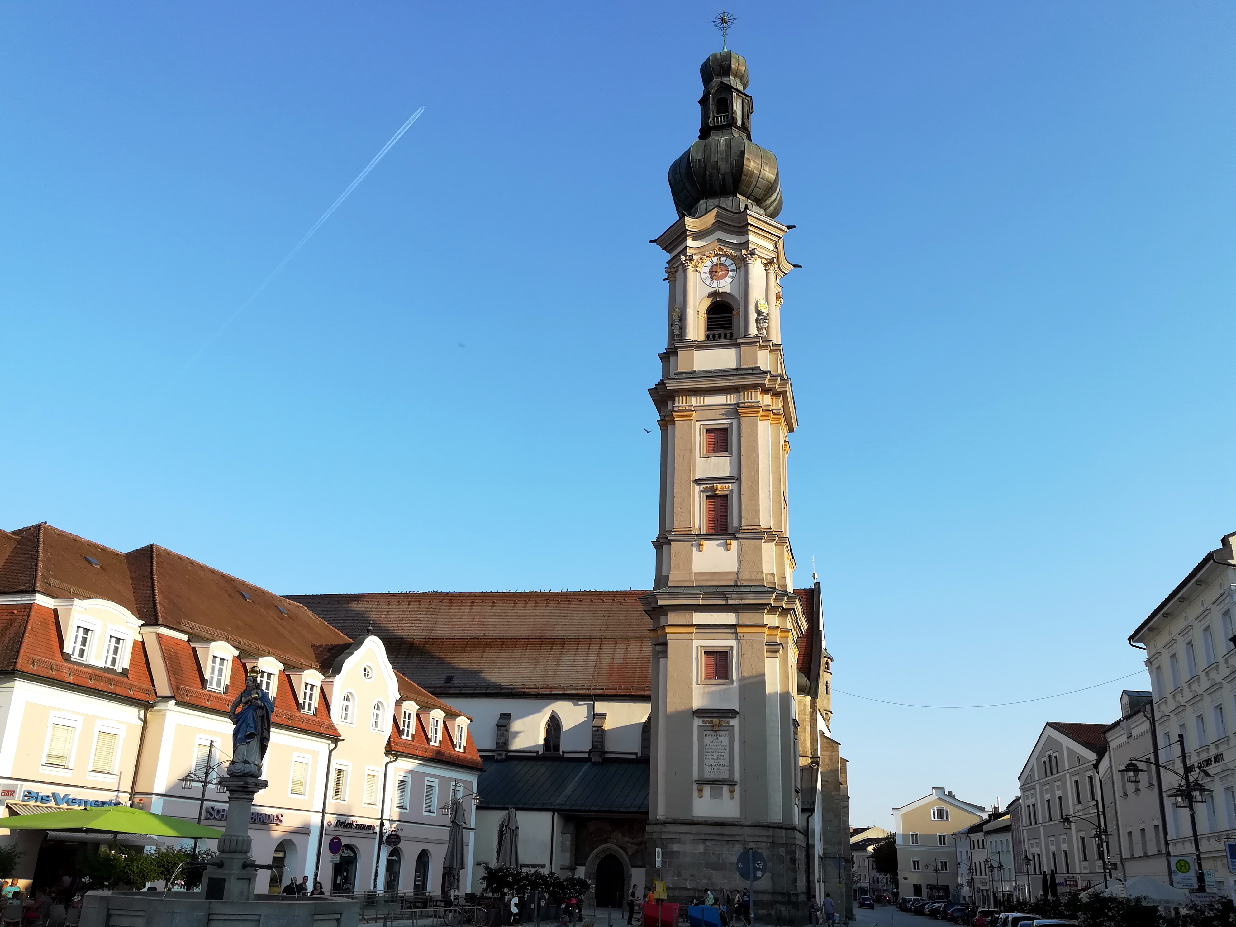 Die Heilig-Grabkirche St. Peter und St. Paul ist eine Filialkirche der Deggendorfer Pfarrei Mariä Himmelfahrt.